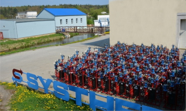 Vymenikova stanice pro topeni.